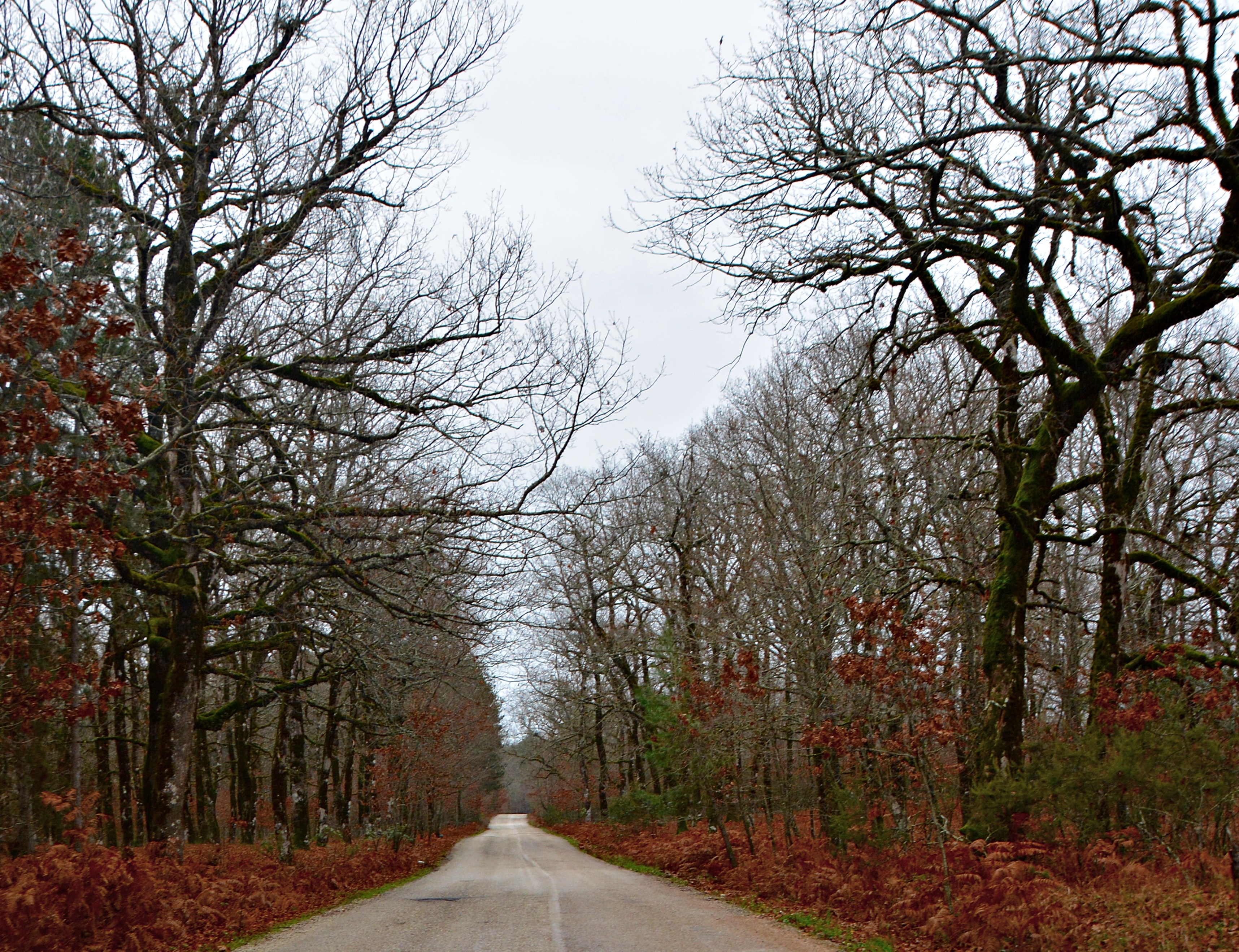 Το περίφημο δρυοδάσος της Φολόης αποτελεί σημείο αναφοράς για τον δασικό πλούτο της ορεινής Ηλείας This is a photography of Natura 2000 protected area with ID GR2330002